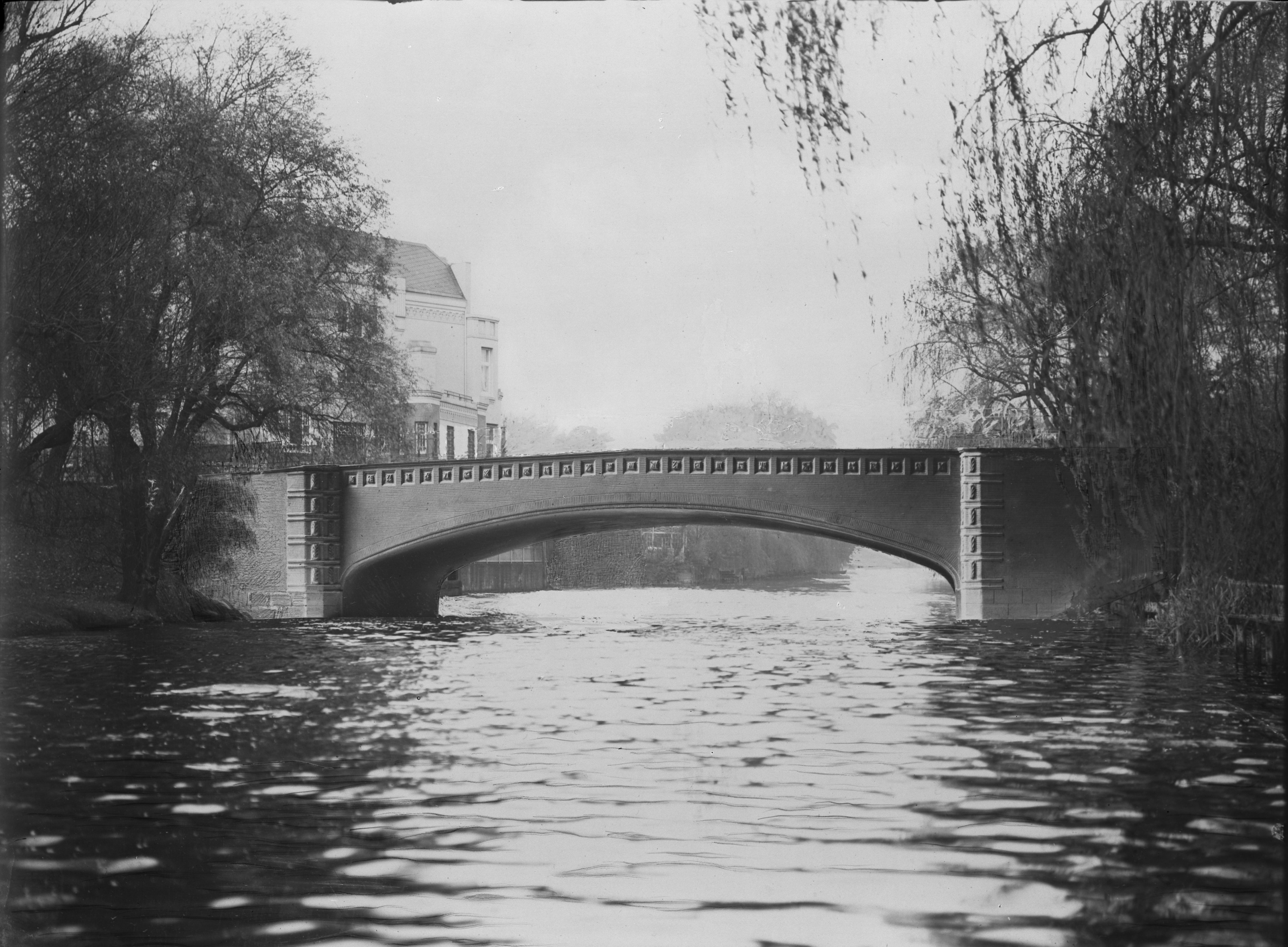 Fernsichtbrücke (neue?) (Hamburg-Winterhude): Ansicht SchumacherWV Nr. 256